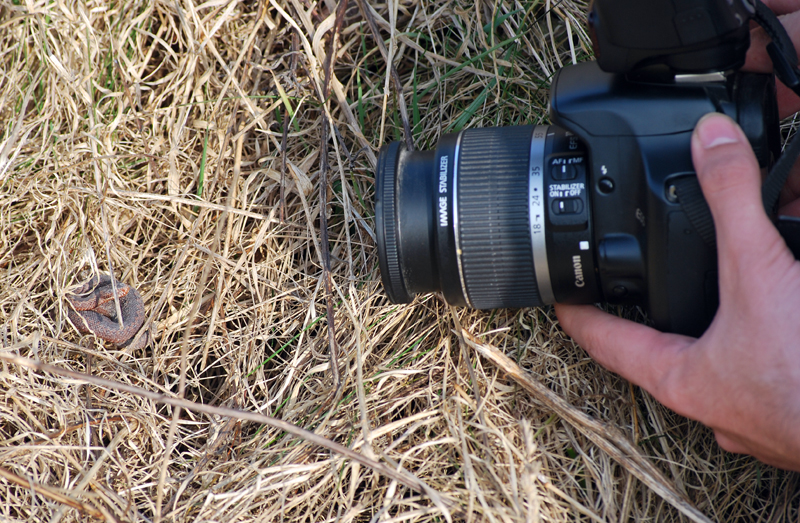 Unge af Vipera berus ved at blive fotograferet af amatør feltherpetolog.